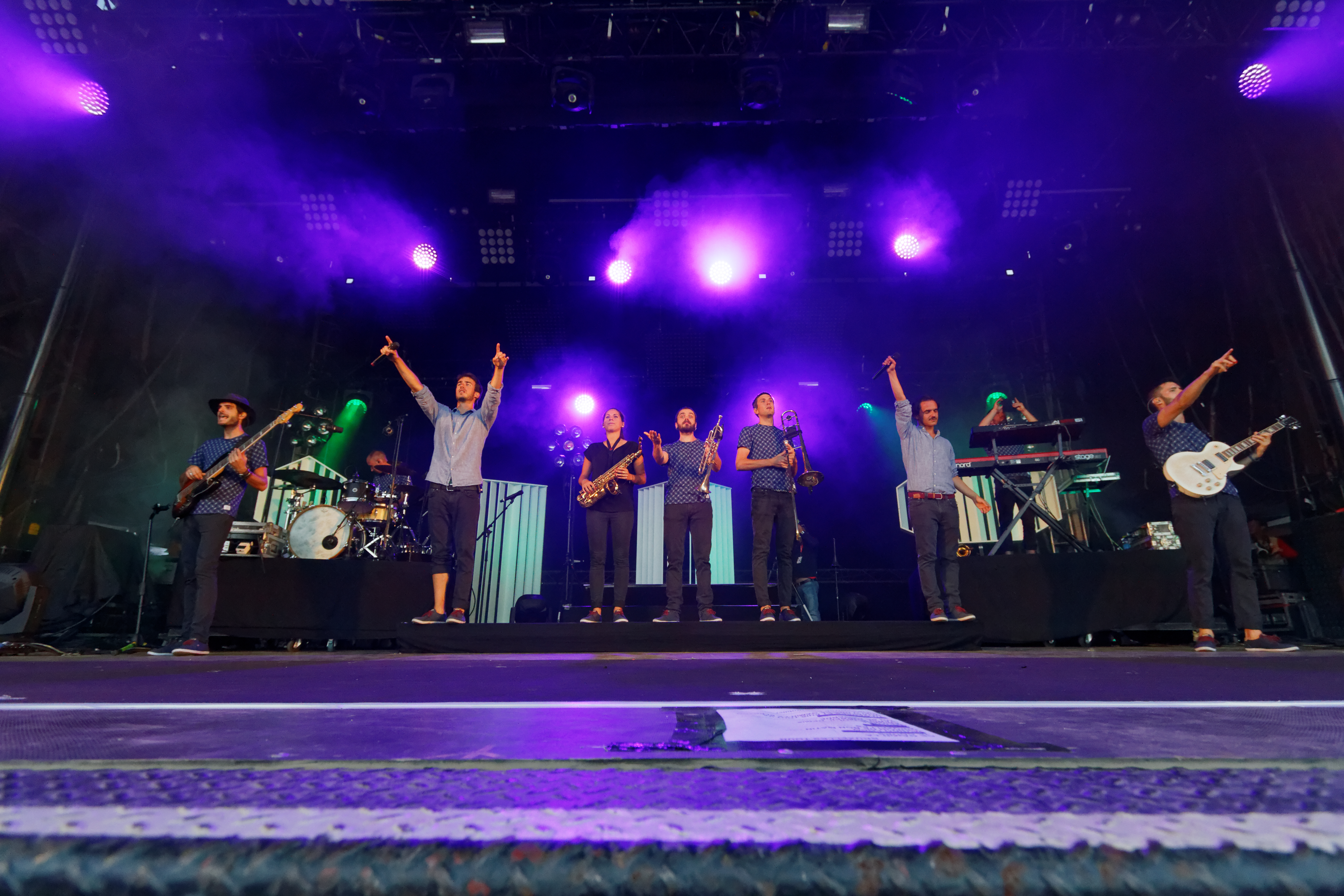 Boulevard des Airs en concert sur la scène Landaoudec lors du festival du Bout du Monde 2016 à Crozon dans le Finistère (France).